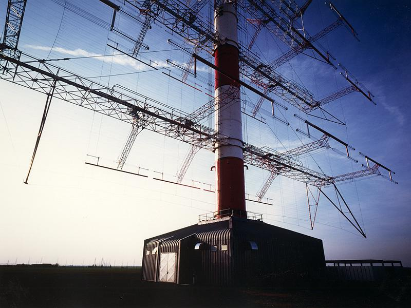 Imagen del sistema ALLISS en una puesta de sol.